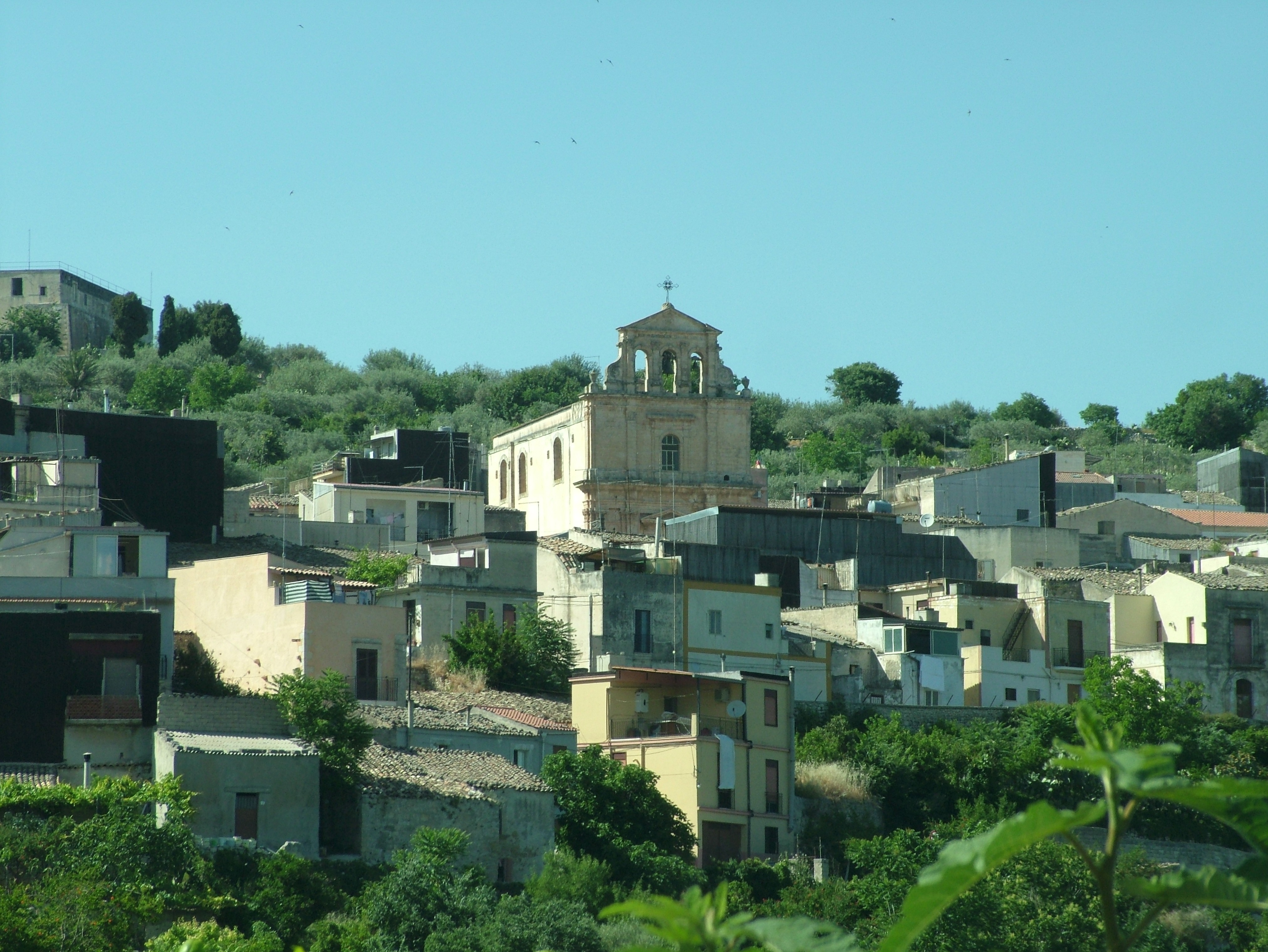 Ferla, Sizilien, Provinz Syrakus, die Ortsnasicht